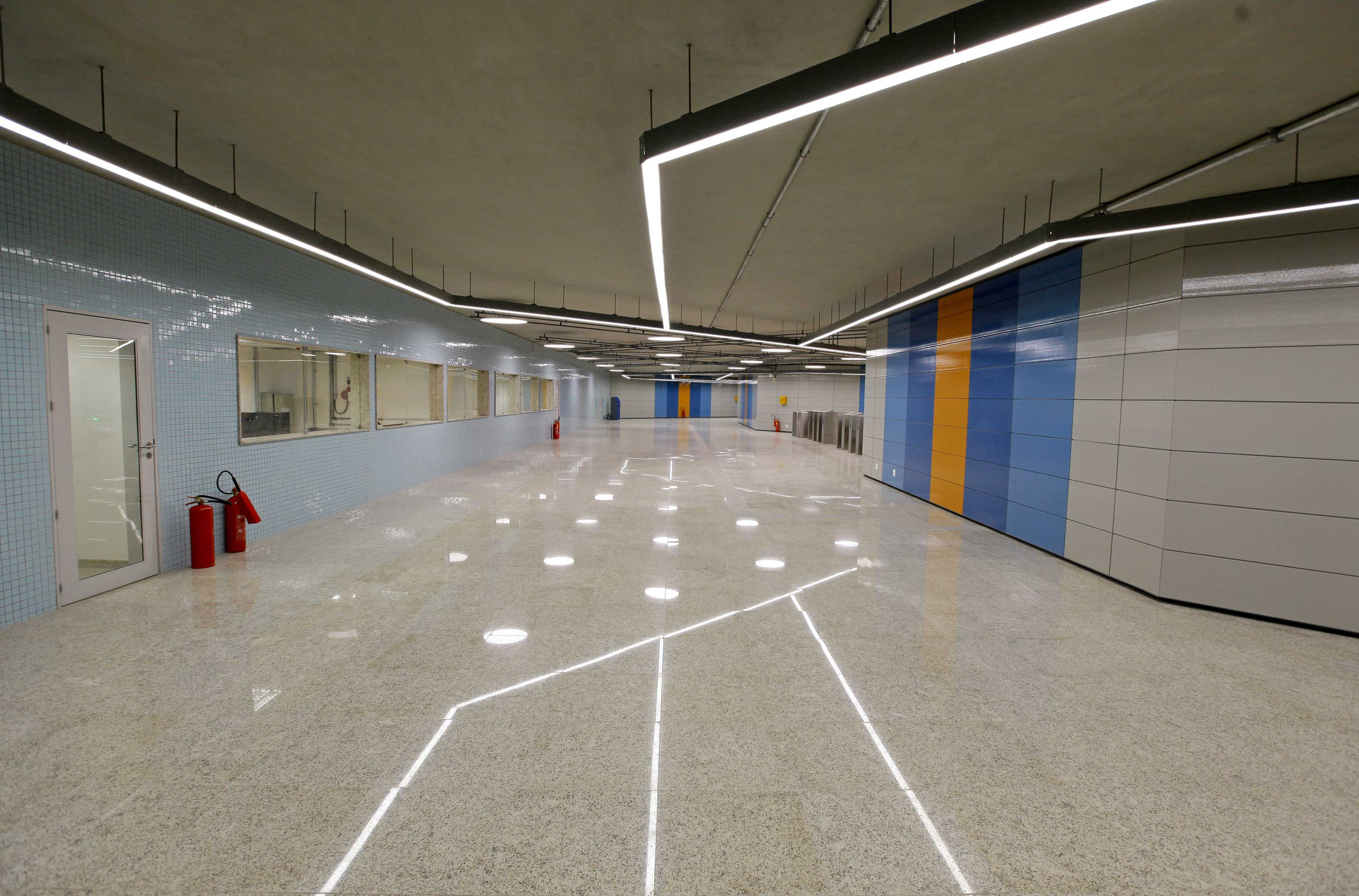 Estação Antero de Quental, no dia da inauguração no Leblon, Rio de Janeiro-RJ.